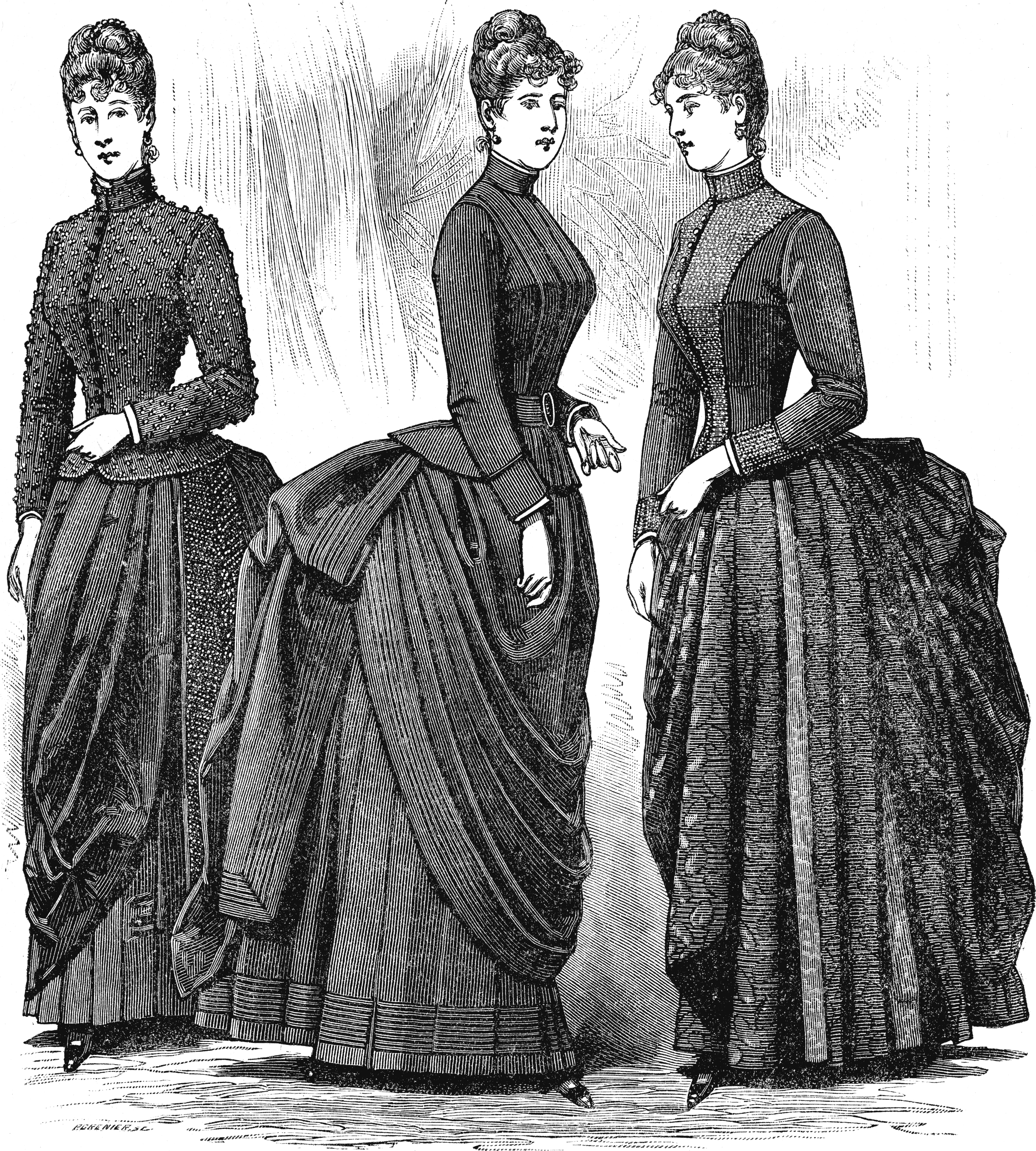 JUPES ET JUPONS TOUT FAITS N• 33 Toutes nos jupes de ville courtes ont une longueur unique : 1m05 devant, 1m10 derrière. Il n'y a que dans le cas où cette longueur serait insuffisante que nous les ferions confectionner sur les mesures commandées. Fig. 503 Fig. 504 Fig. 505 Fig. 503.— JUPE— drapée en cheviotte noire, garnie d'une belle quille noire, garnie d'une belle quille en jais 49. » Fig. 504.— JUPE— drapée en cheviotte noire ou couleur, garnie de 11 rangs de piqûres 39. » Fig. 505.— JUPE— drapée en beau tissu, dentelle à jour, pure laine, gatine de rubans de moire. 39. »